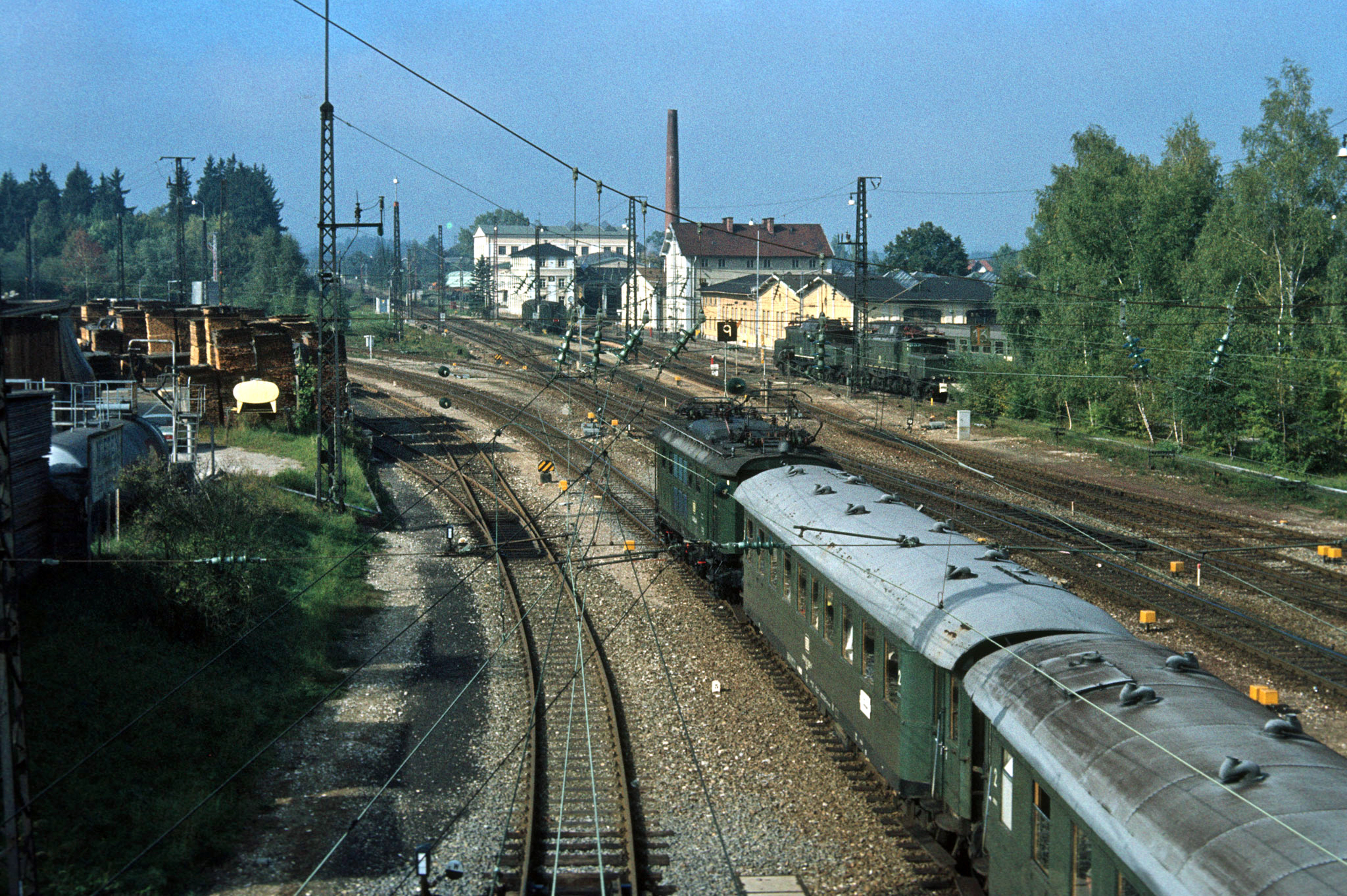 Ein aus Vorkriegseilzugwagen gebildeter Nahnverkehrszug verläßt den Bahnhof Freilassing Richtung Berchtesgaden. Gezogen wird er von der 144 504-8. Im Hintergrund ist das Bahnbetriebswerk Freilassing zu erkennen, heute Lokwelt Freilassing.